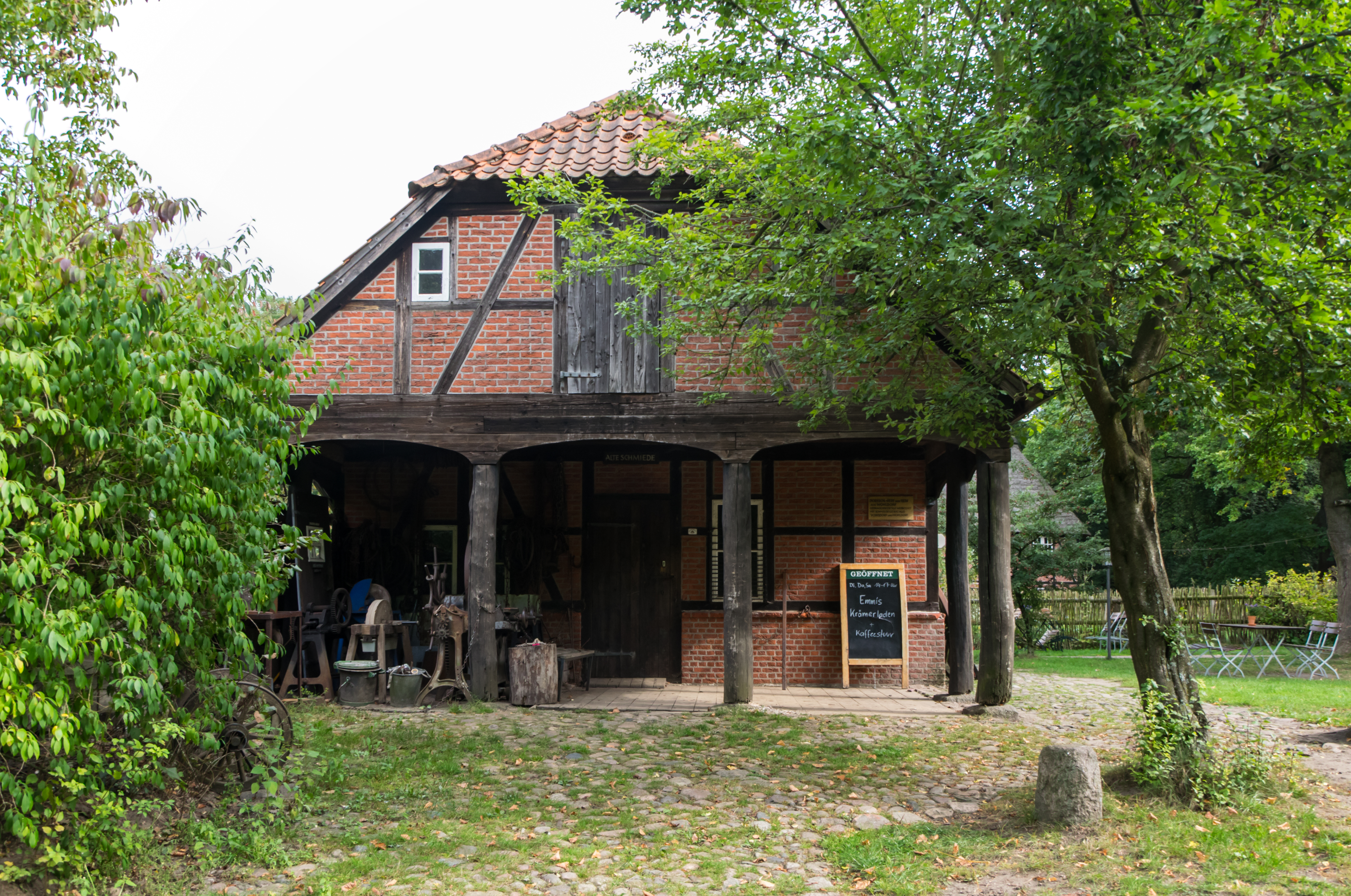 HH-Volksdorf Museumsdorf Alte Schmiede